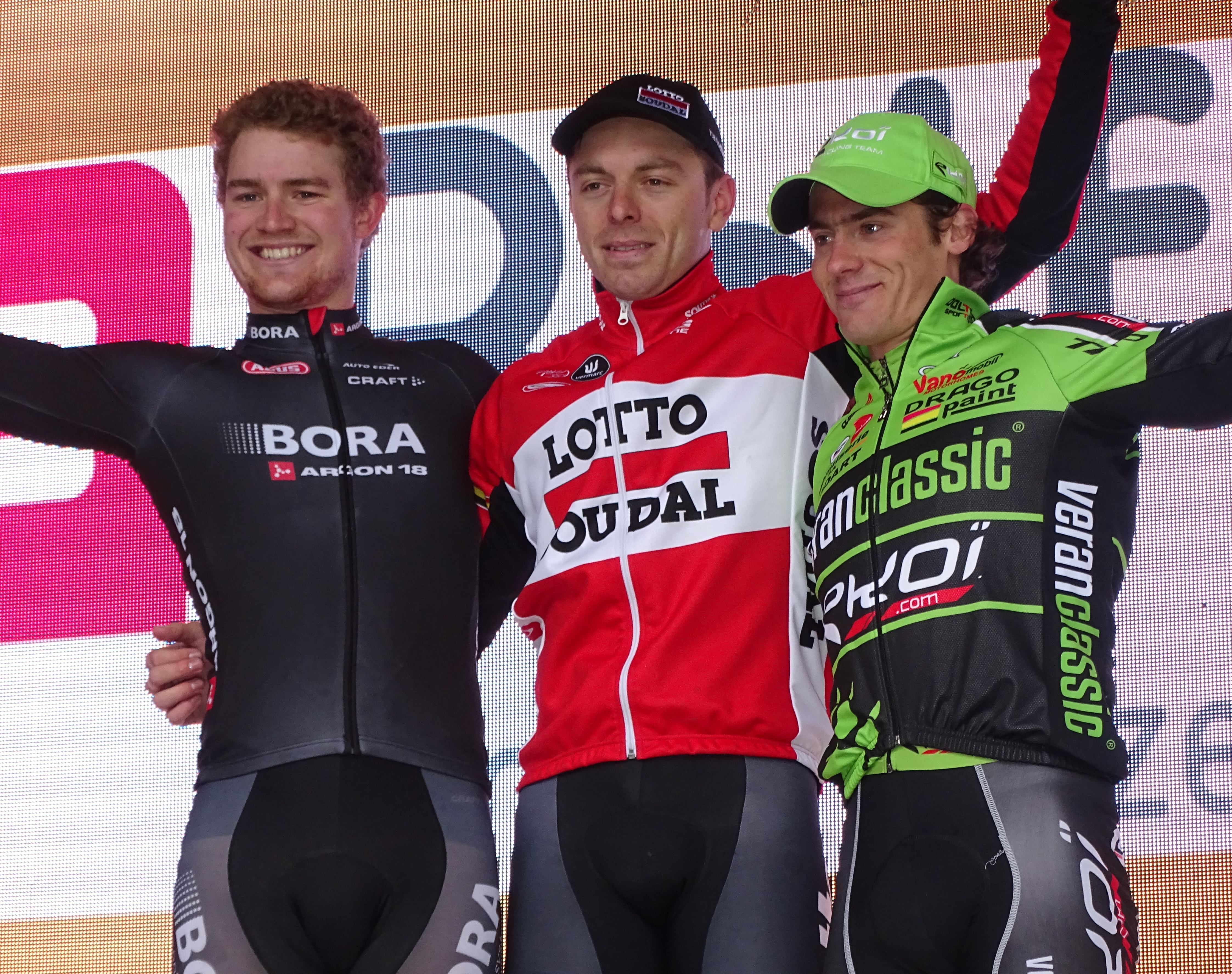 Reportage réalisé le mercredi 18 mars à l'occasion de l'arrivée de la Nokere Koerse 2015 à Nokere (Kruishoutem), Belgique.